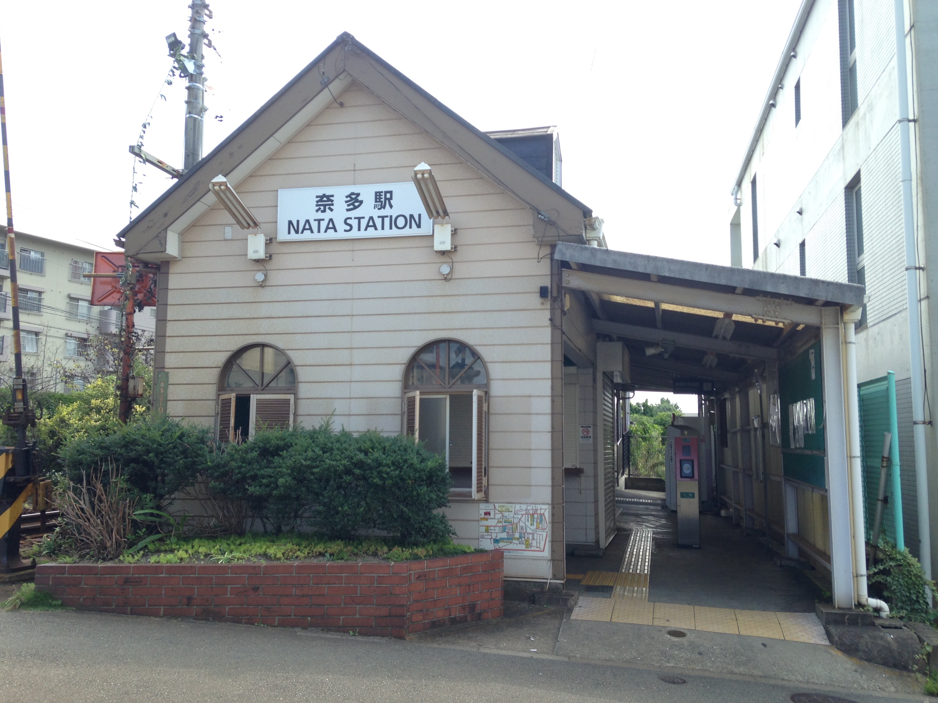 奈多駅駅舎